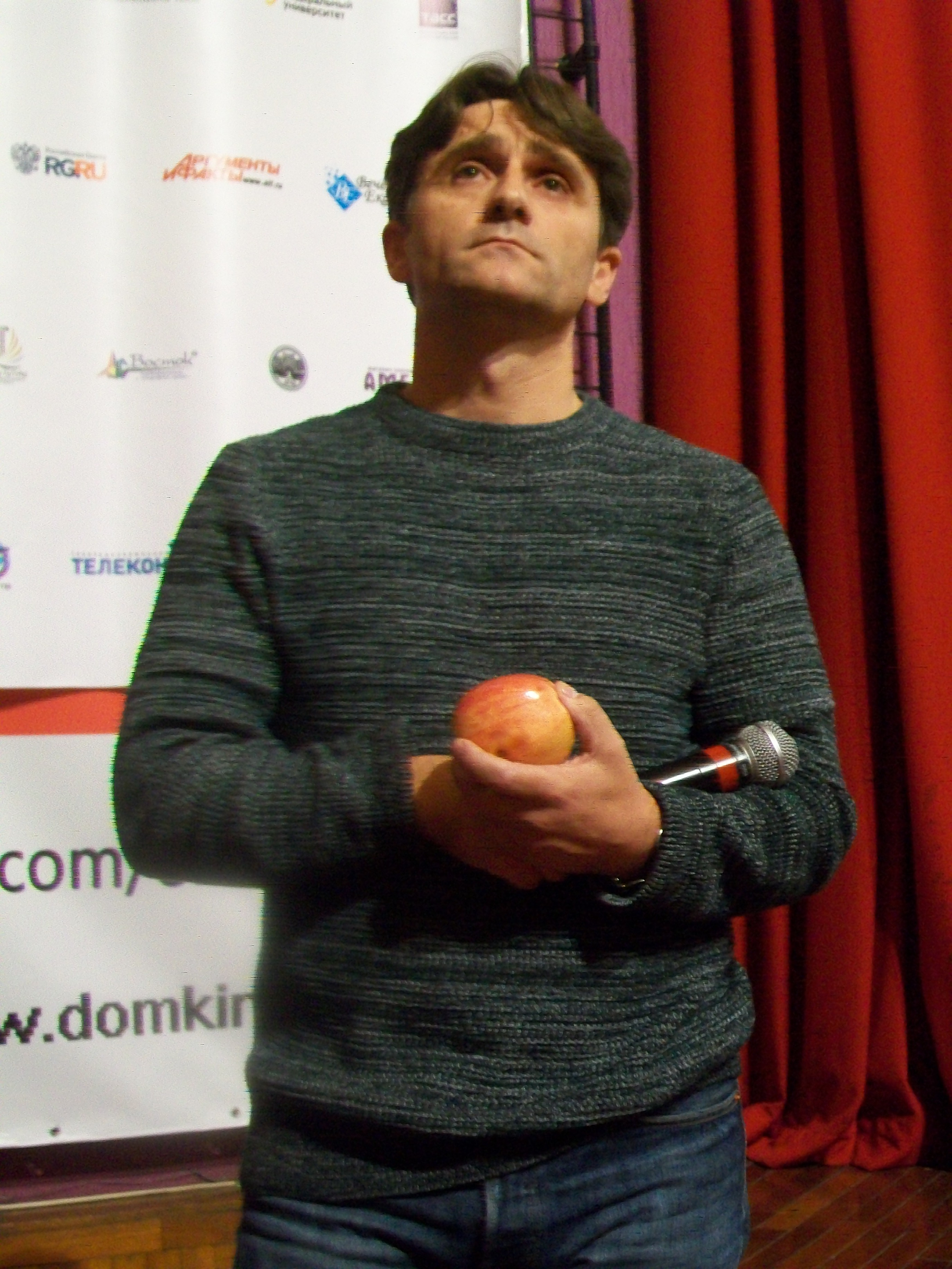 Сербский снайпер Деян Берич представляет док. фильм о себе. Екатеринбург, Дом кино. 6 октября 2018 года